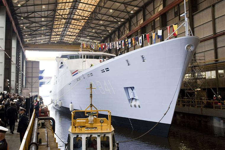 Doop van het tweede patrouilleschip Zeeland.